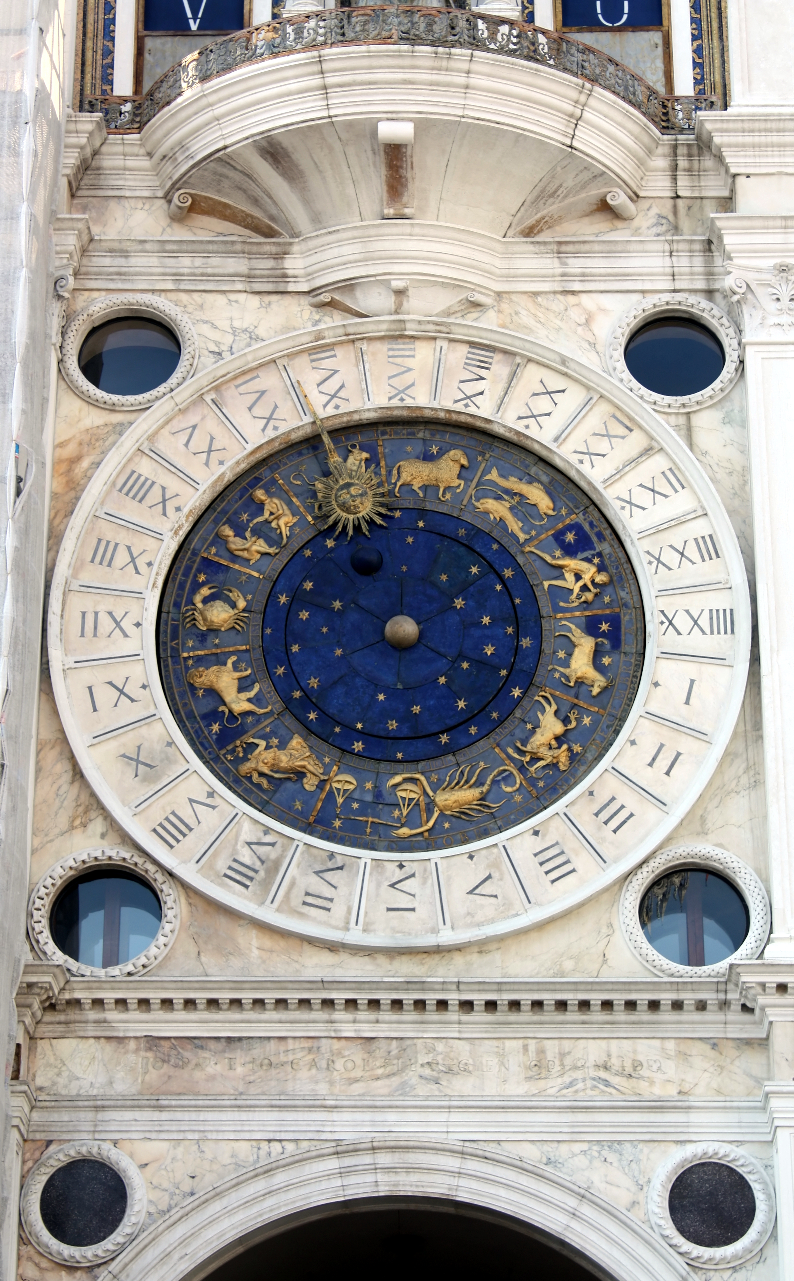 Horloge de la Tour de l'Horloge sur la place Saint-Marc à Venise.